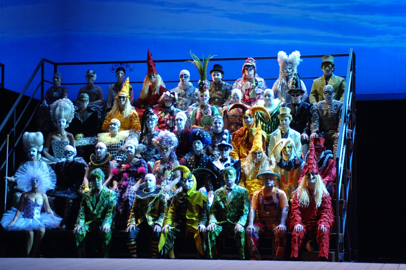 מפיסטופלה 2007